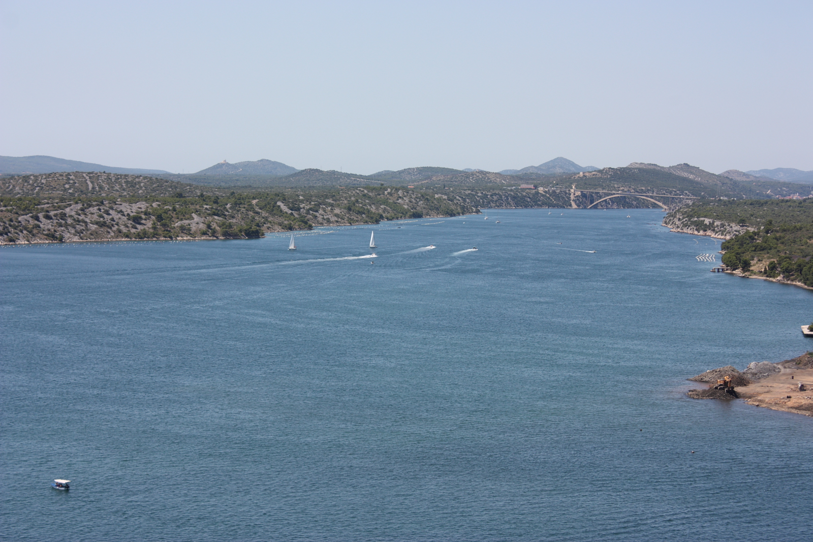 Sibenik